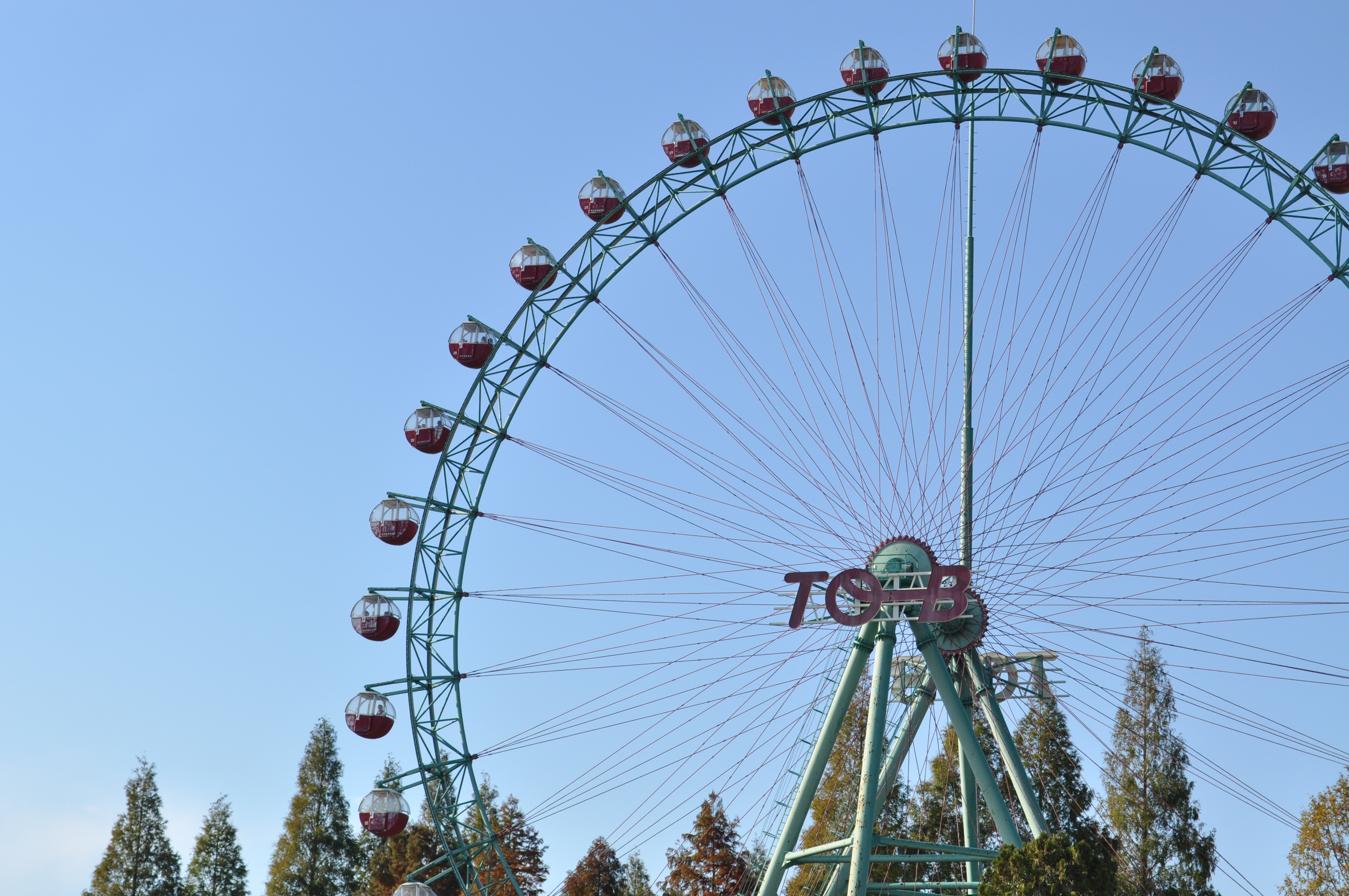 2012年、東武動物公園の観覧車